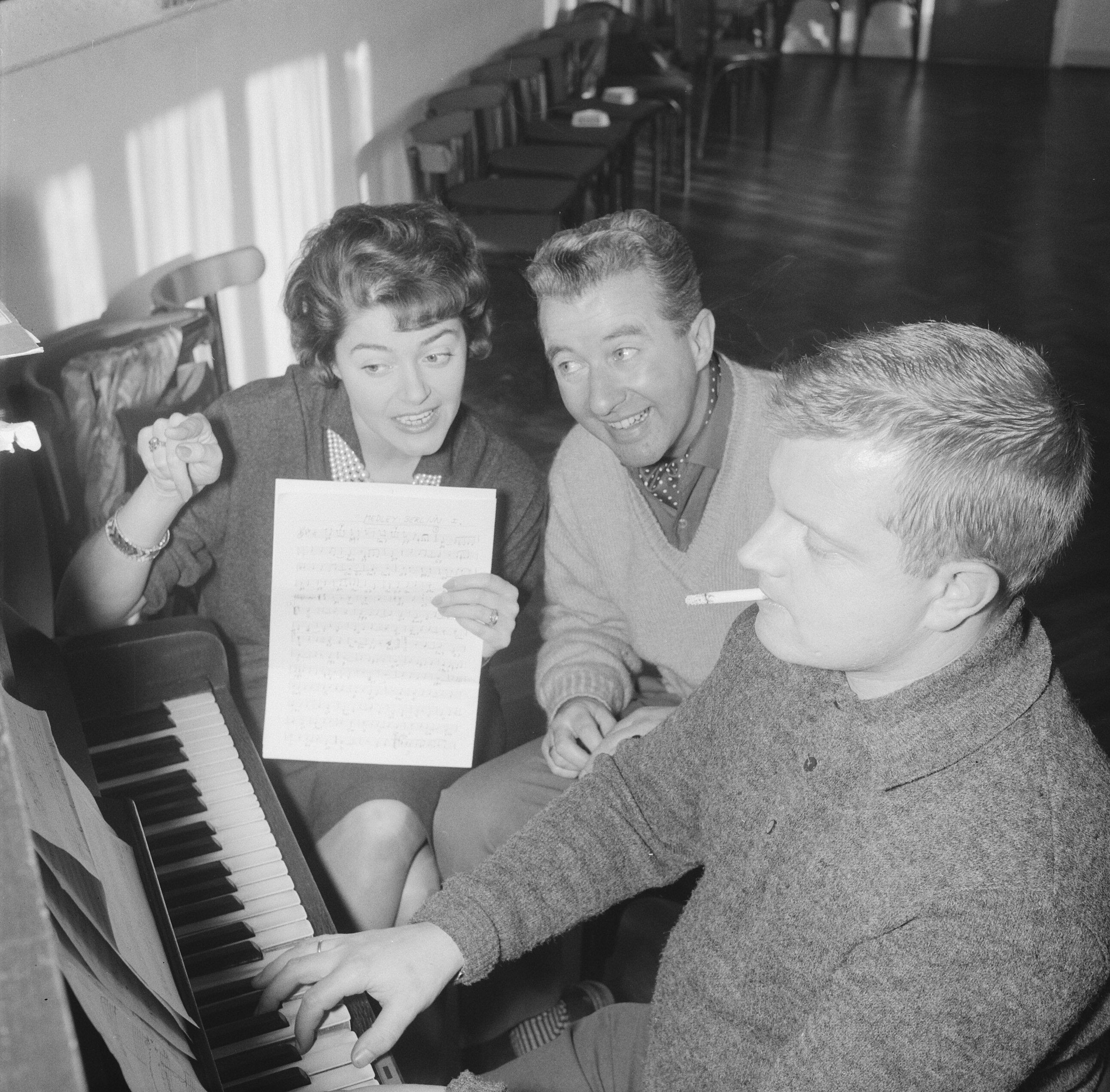 Collectie / Archief : Fotocollectie Anefo Reportage / Serie : [ onbekend ] Beschrijving : Teddy en Henk Scholten gaan naar Duitse TV. Teddy en Henk Scholten en hun pianist Wim Jongbloed Datum : 11 december 1961 Locatie : Duitsland Trefwoorden : artiesten, muziek, pianisten, televisie, zangeressen Persoonsnaam : Jongbloed Wim, Scholten, Henk, Scholten, Teddy Fotograaf : Nijs, Jac. de / Anefo Auteursrechthebbende : Nationaal Archief Materiaalsoort : Negatief (zwart/wit) Nummer archiefinventaris : bekijk toegang 2.24.01.03 Bestanddeelnummer : 913-2781